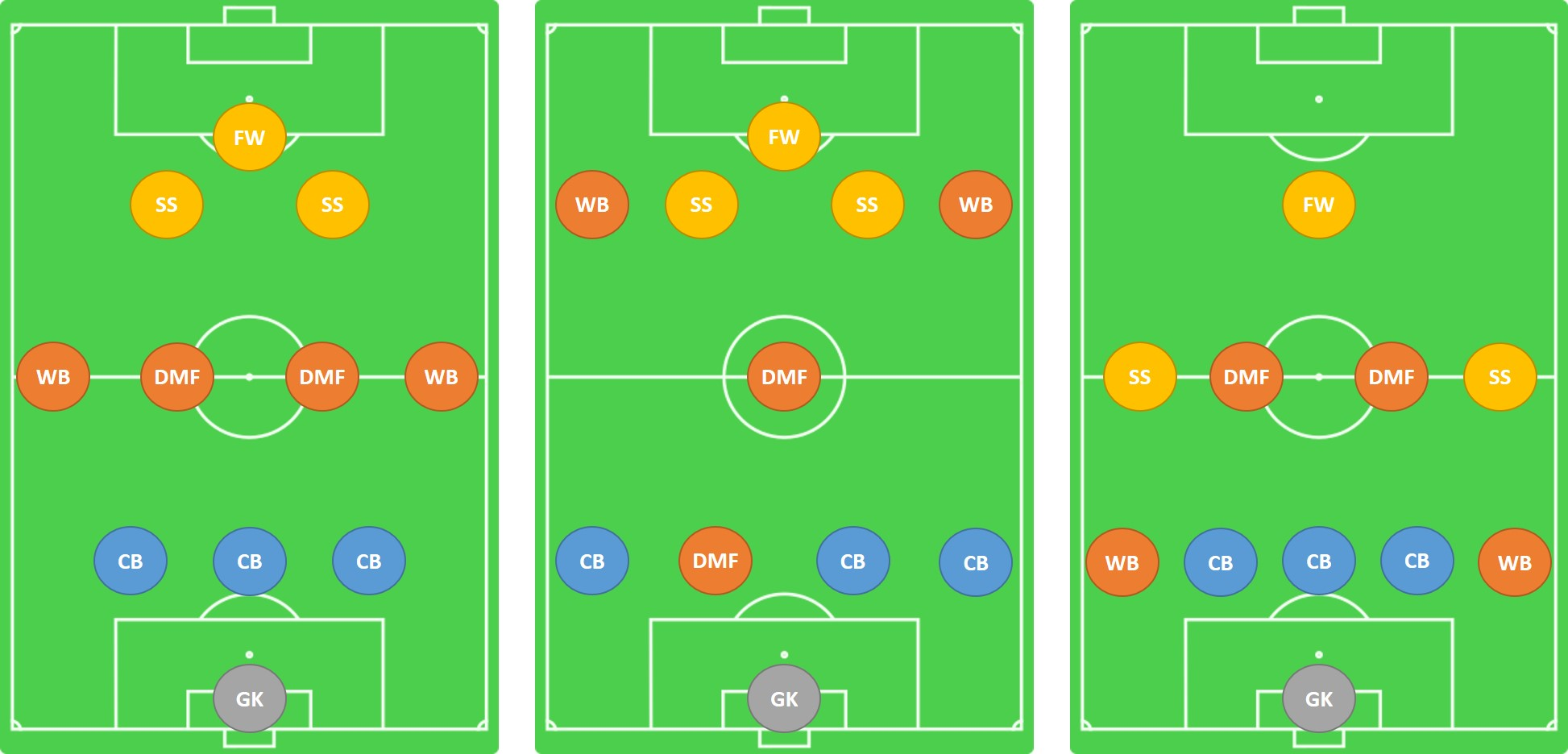 ミシャ式簡易図。 File:Soccer Field Transparant.svgを基に作成。